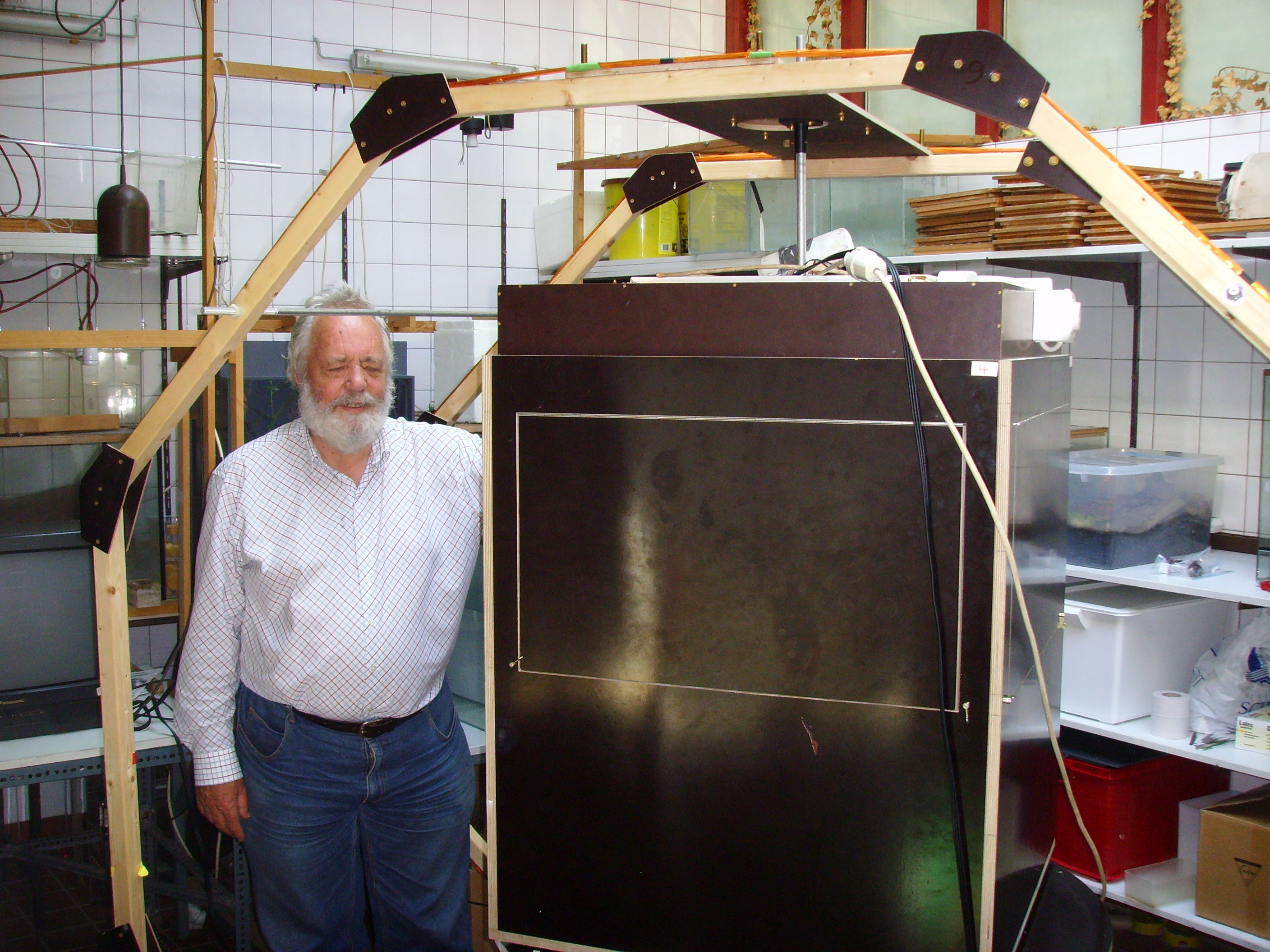 Der Ornithologe Prof. Wolfgang Wiltschko, Universität Frankfurt am Main, neben einer Versuchsanordnung zum Nachweis des Magnetsinns bei Hühnerküken.